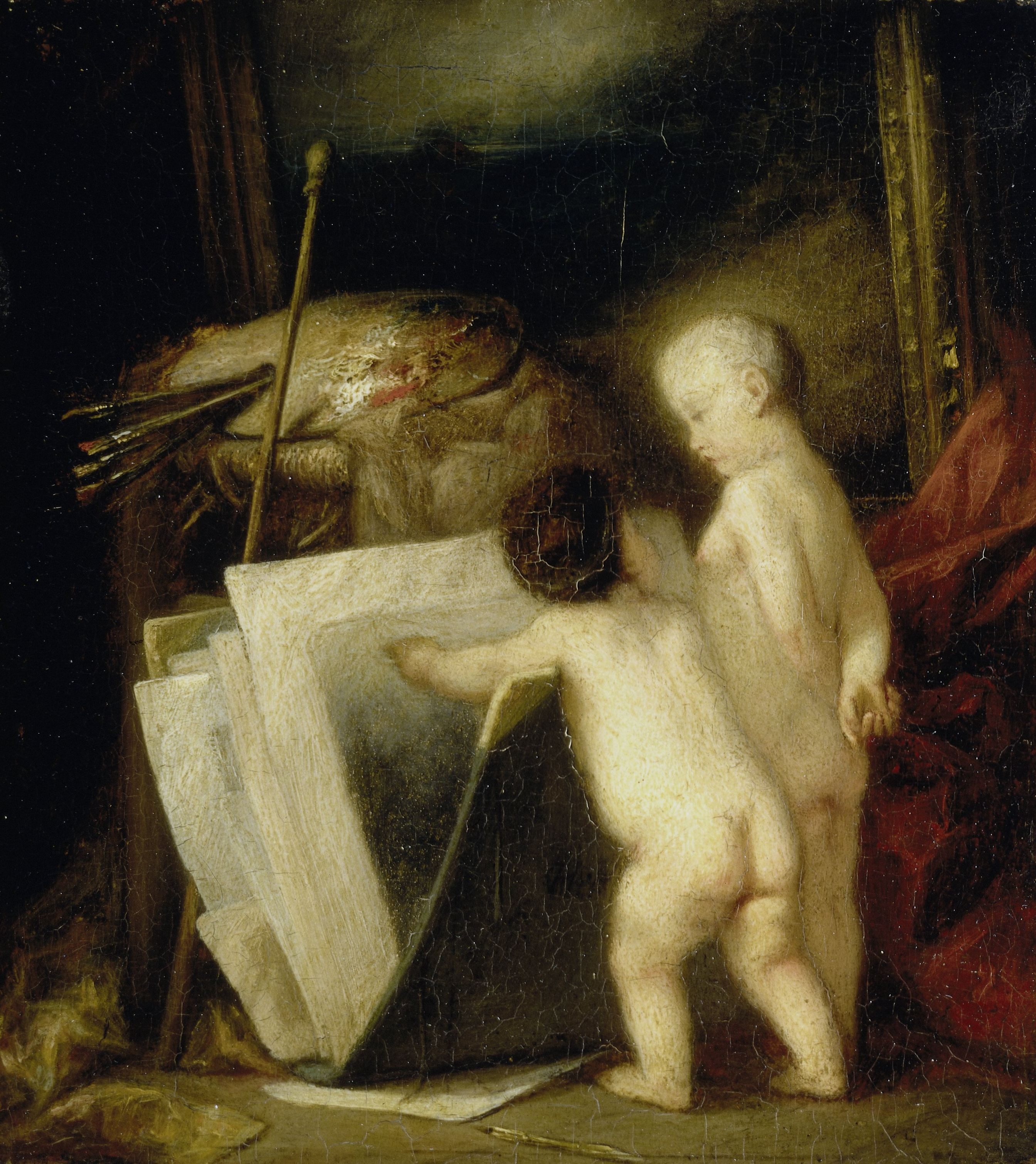 De kleine kunstliefhebbers. 1840-1886. oil on panelmedium QS:P186,Q296955;P186,Q1348059,P518,Q861259. 16.5 × 14.5 cm (6.4 × 5.7 ″). Amsterdam, Rijksmuseum Amsterdam.